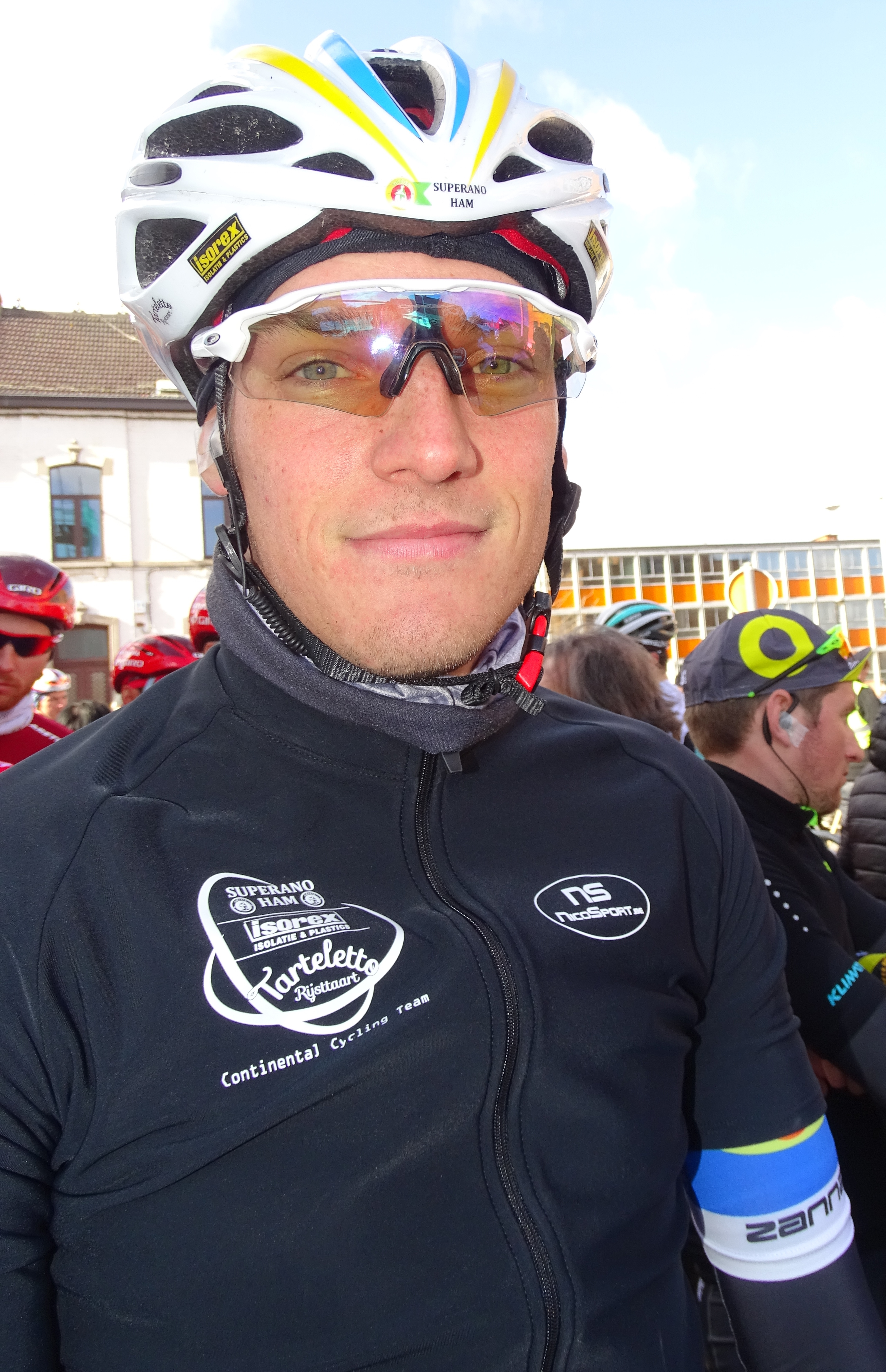 Reportage réalisé le mercredi 2 mars à l'occasion du départ du Samyn des Dames 2016 et du Samyn 2016 à Quaregnon, Belgique.